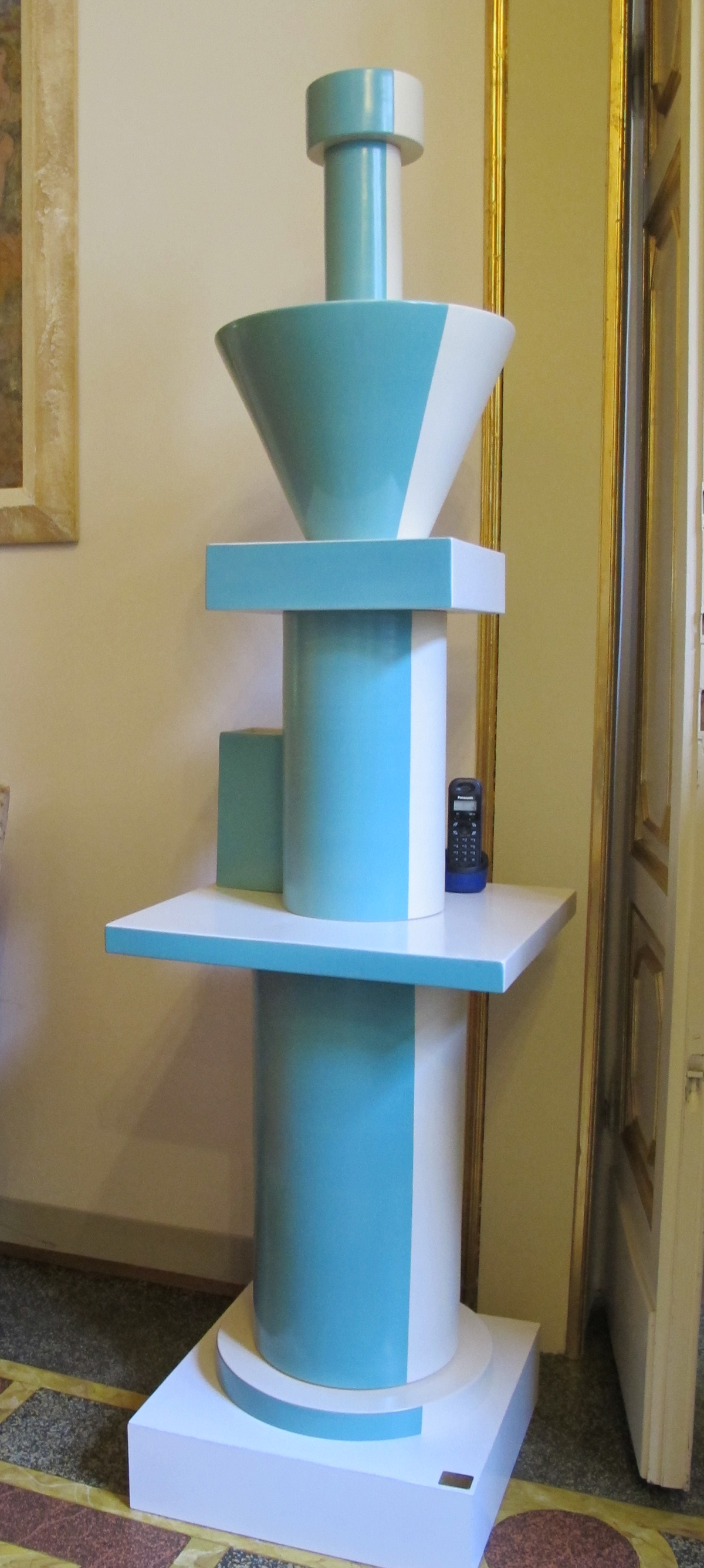 Ettore sottsass, design totem